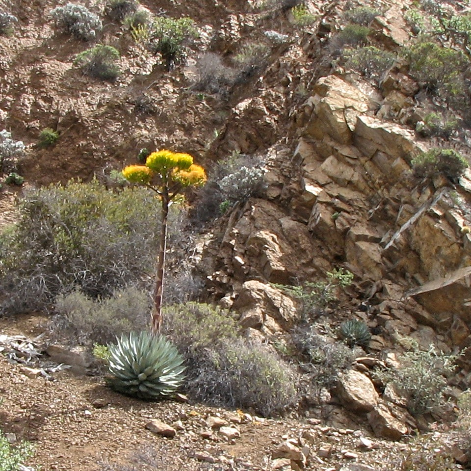 Agave sebastiana in Islas San Benito in Baja Kalifornien Süd